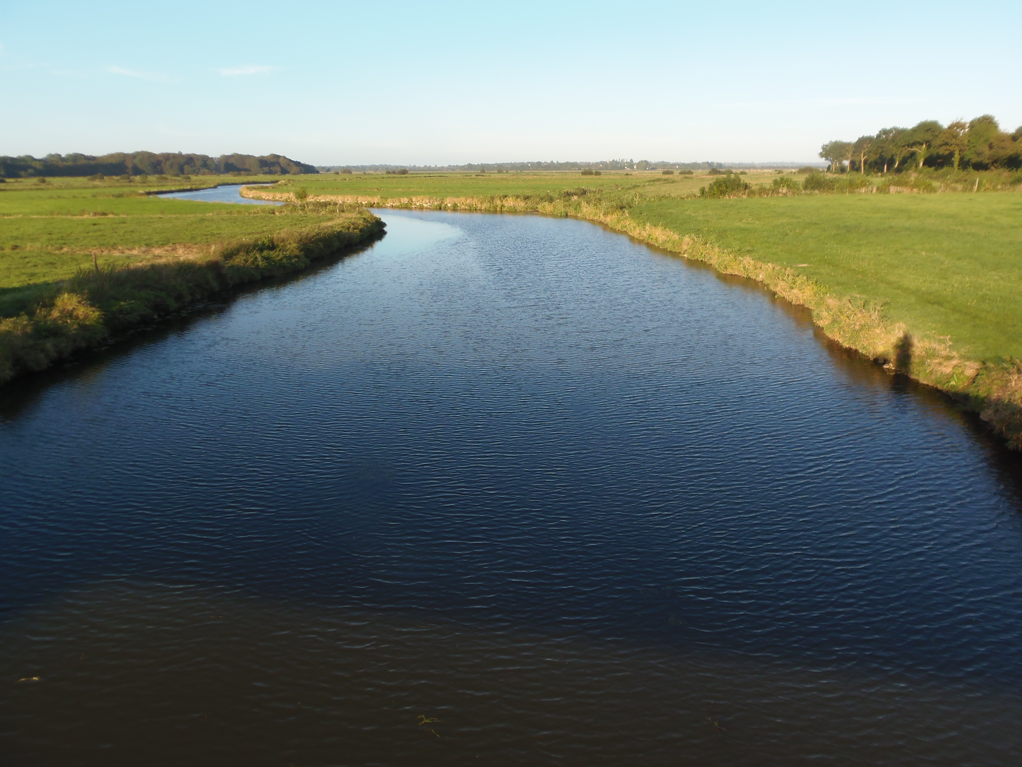 La Douve entre Picauville, à gauche, et Beuzeville-la-Bastille, à droite (Normandie, France).